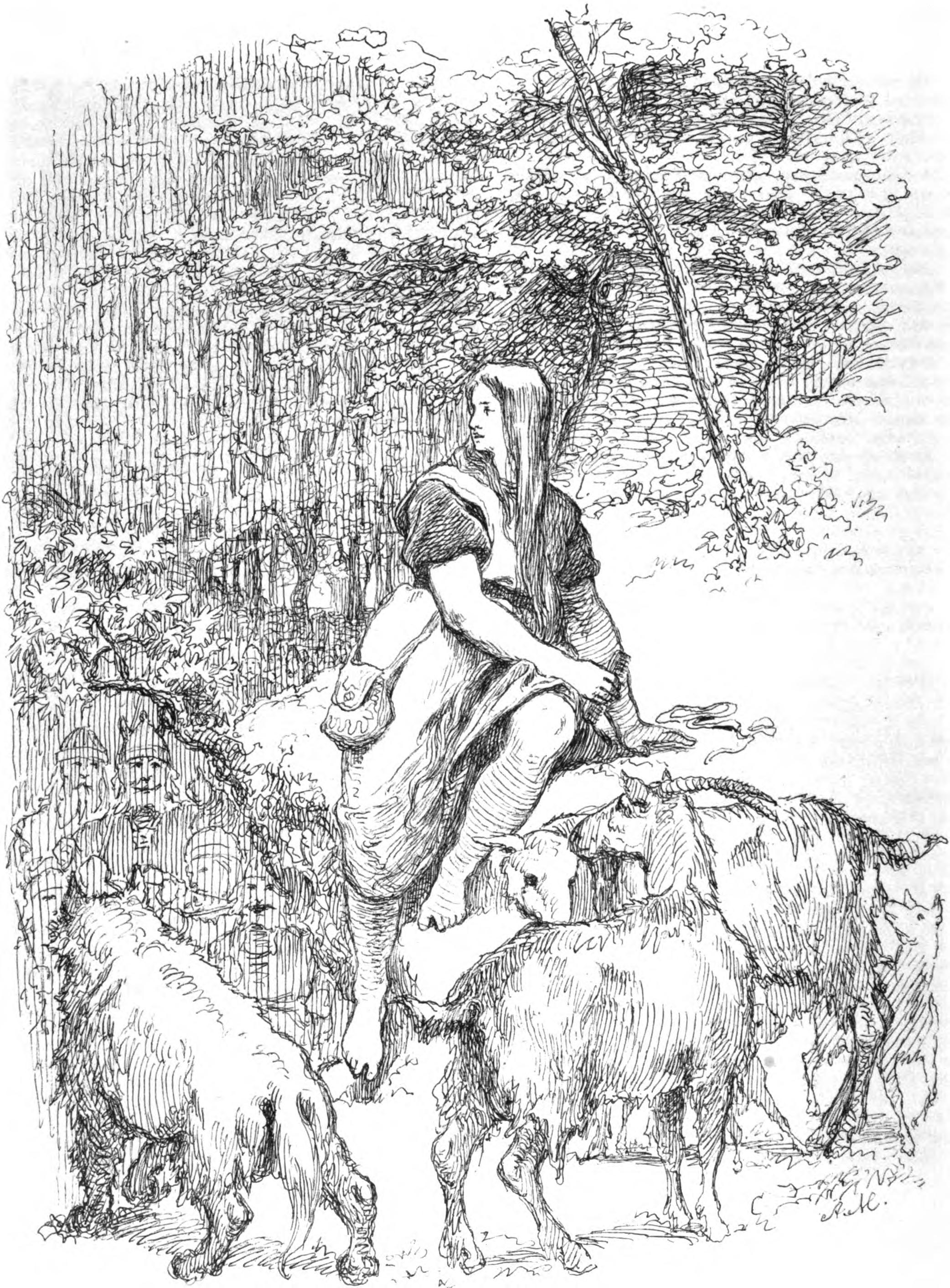 Drottning Yrsatitle QS:P1476,sv:"Drottning Yrsa"